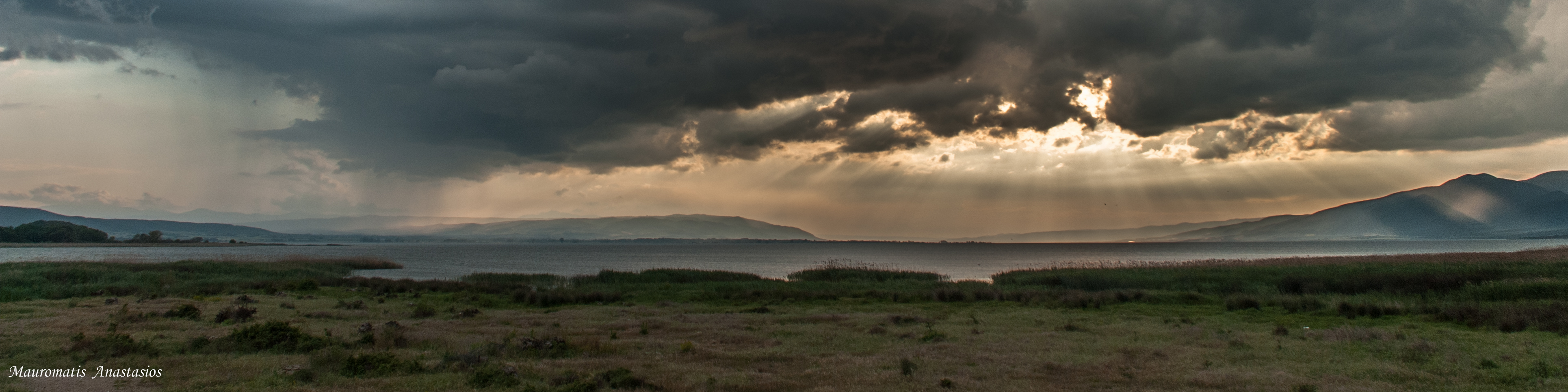 Πανόραμα This is a photography of Natura 2000 protected area with ID GR1220001